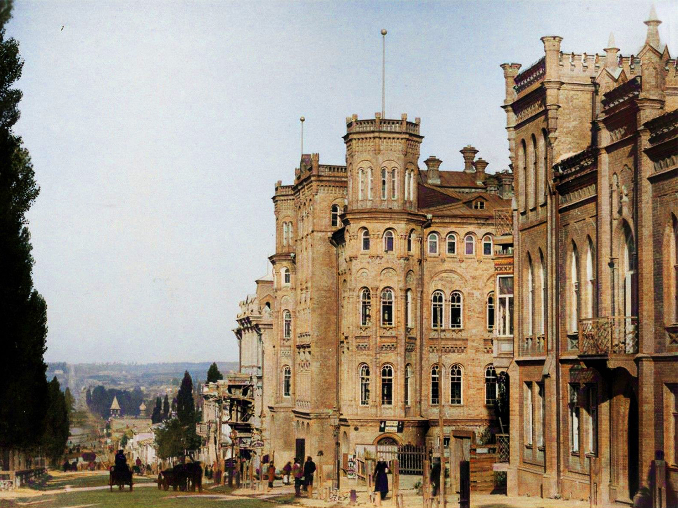 Будинок прибутковий, Київ, бульвар Тараса Шевченка, 36 (36/14, 36-а, 36 літ. А — тех. адреса)